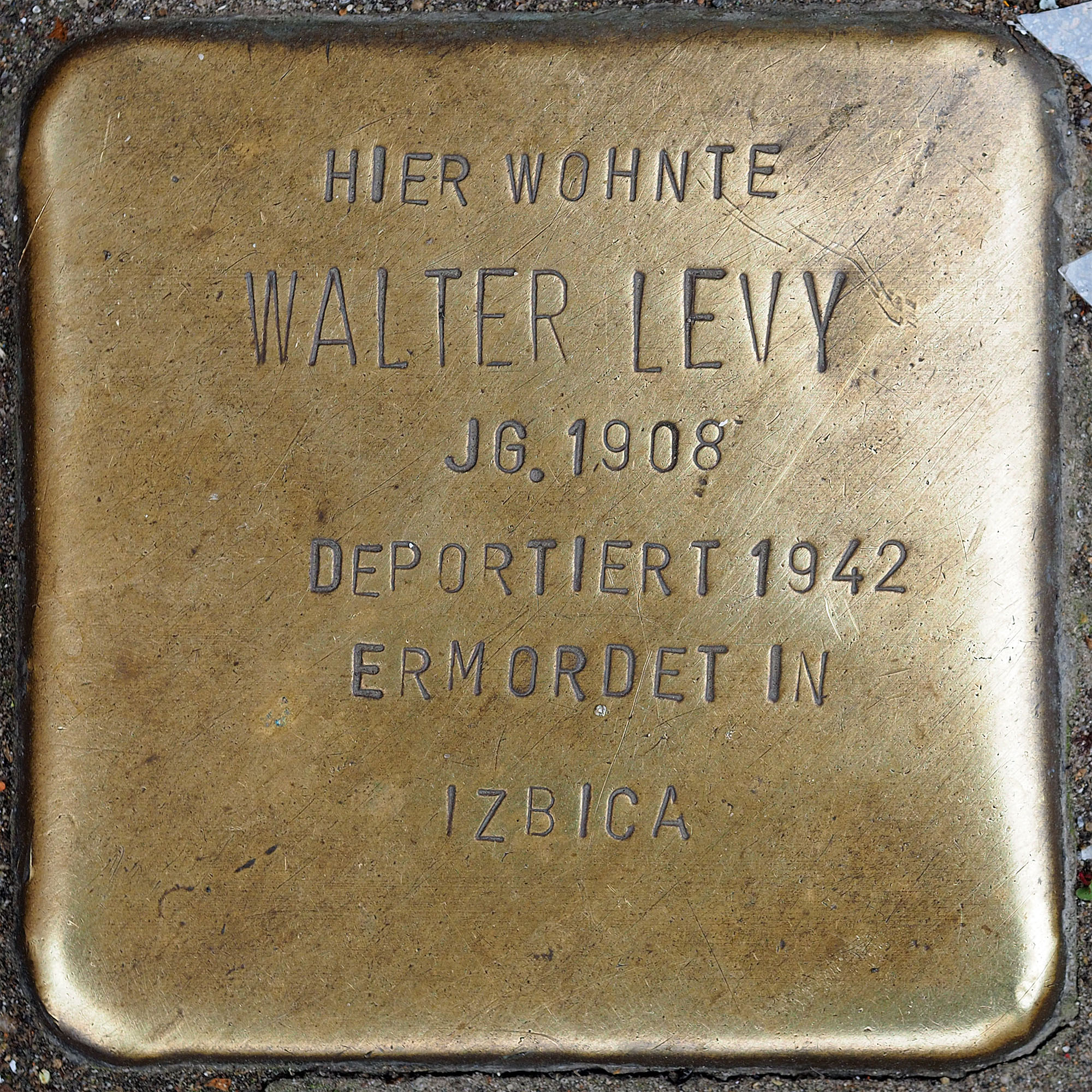 Stolpersteine MG: Levy, Walter